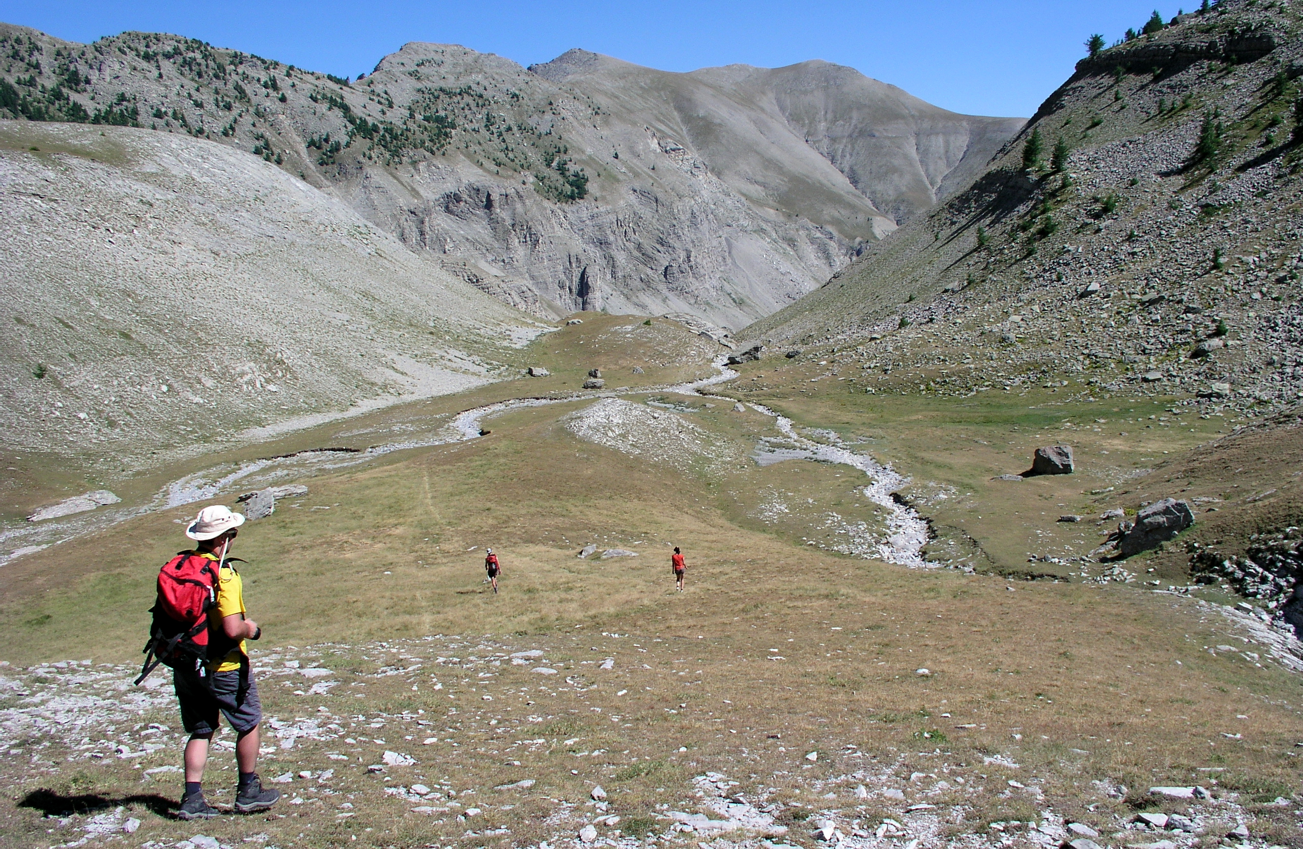 Randonnée en montagne. Les Bas Pasqueires, Castellet-lès-Sausses, Alpes-de-Haute-Provence, France.